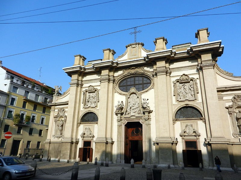 Milano - Chiesa di S. Maria della Passione